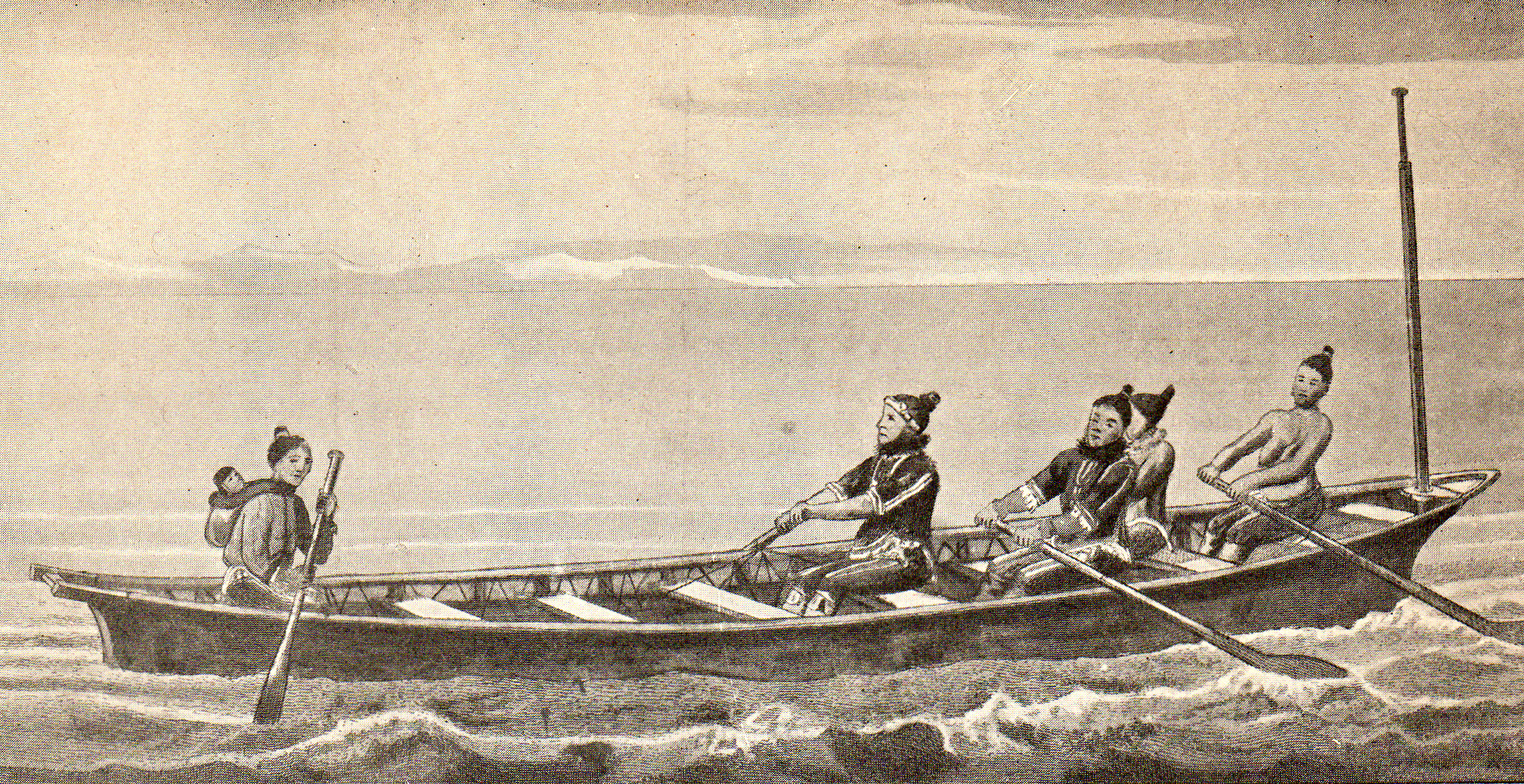 Konebåd i grønland; Graahs rejse 1828-31